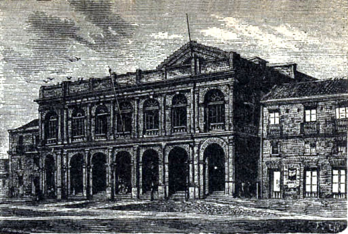 Teatro Municipal de Santiago en 1872.